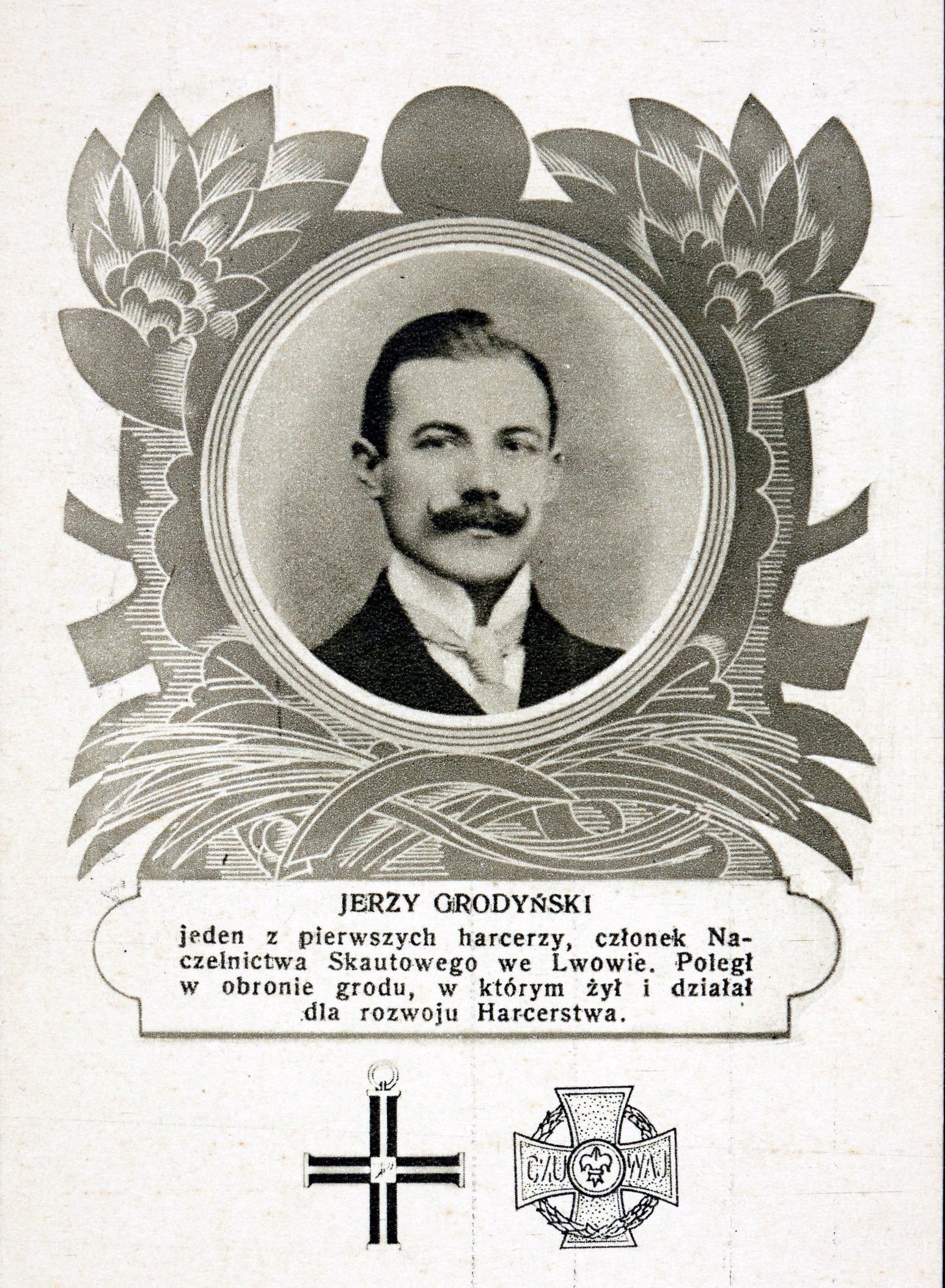 Jerzy Grodyński, pocztówka z 1935 r.